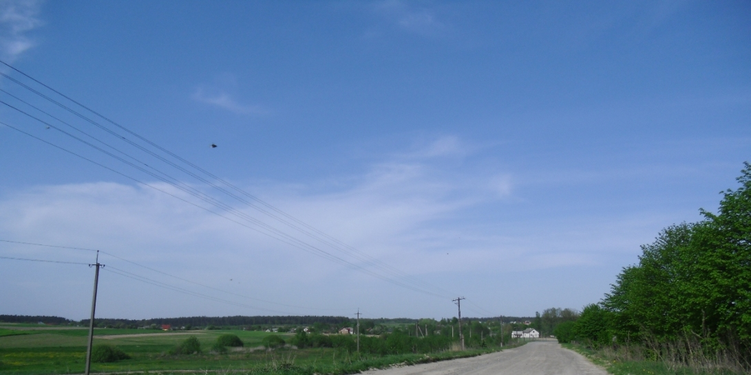 Дорога_в_Черчик.: с. Черчик Яворівського р-ну.